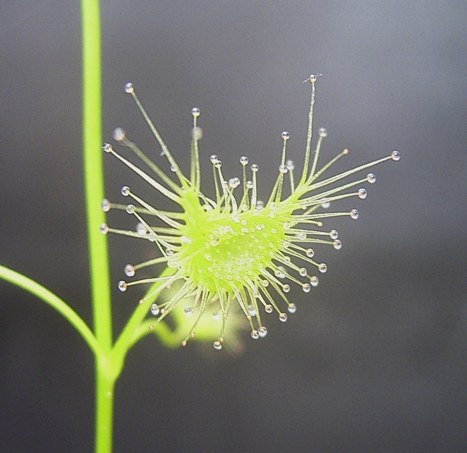 Lamina Drosera peltata